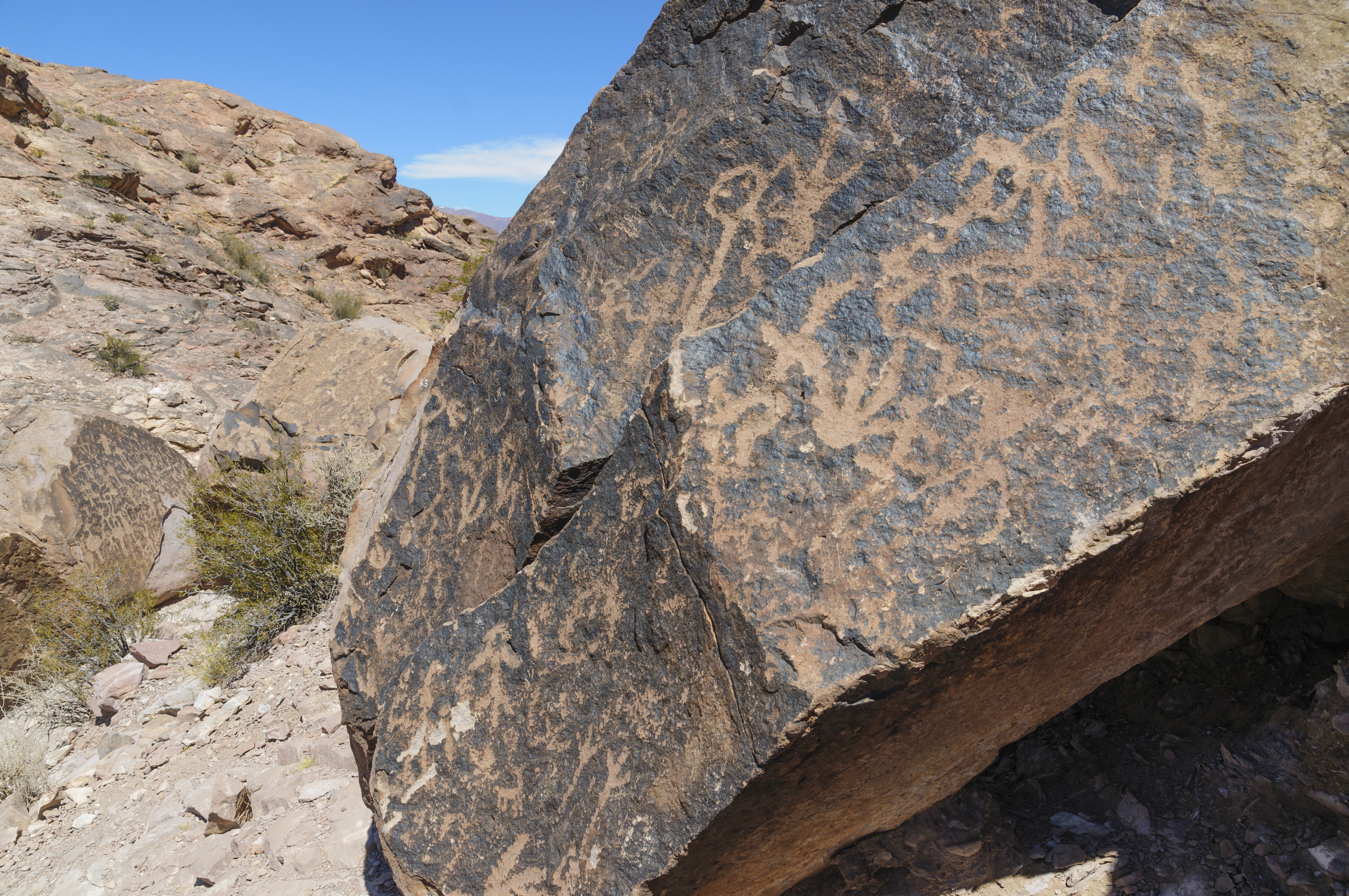 Petroglifos en Tunduqueral